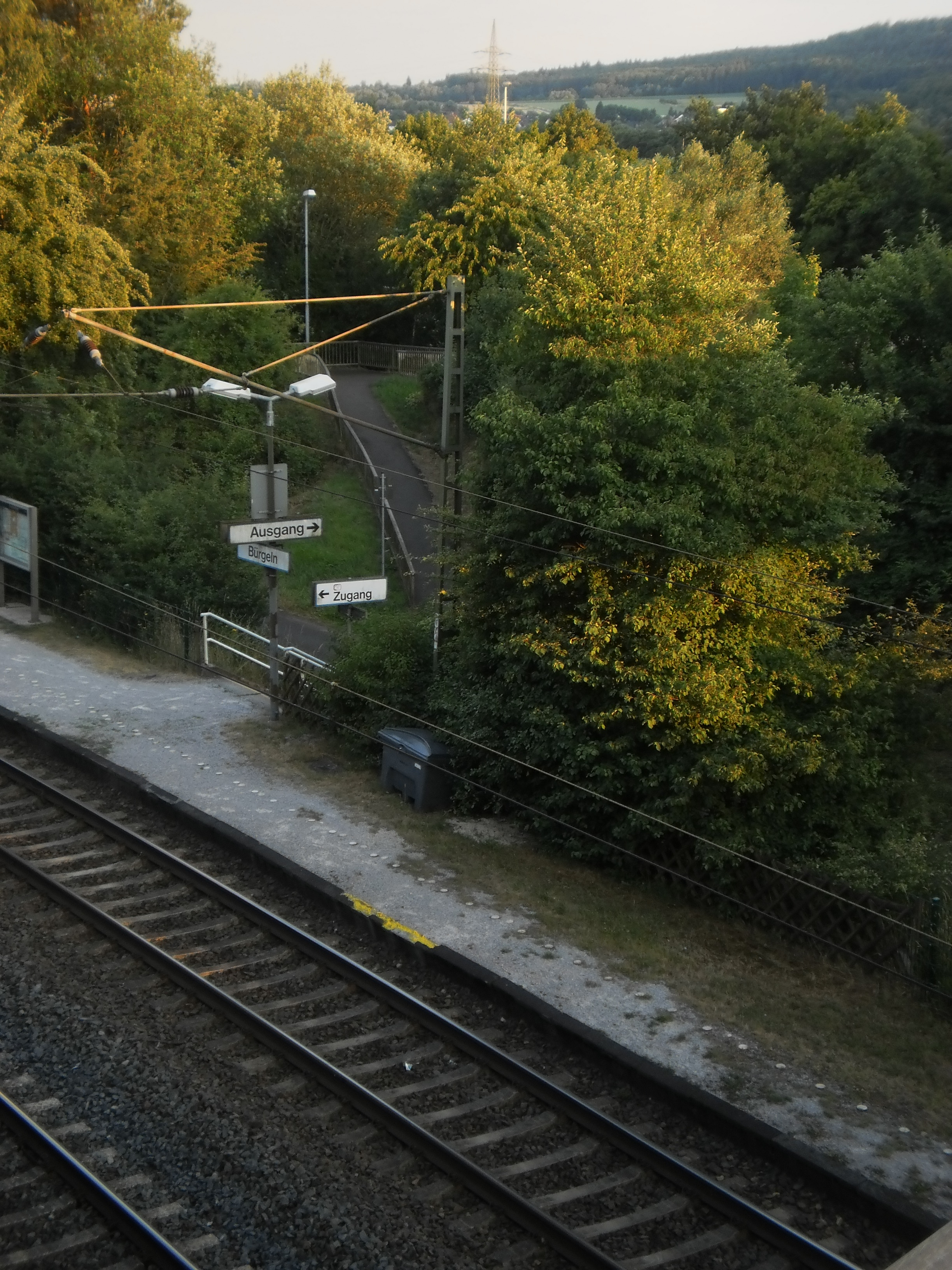 Haltepunkt Bürgeln an der Main-Weser-Bahn mit einigen Häusern des nahegelegenen Marburg-Ginseldorf im Ohmtal (10 min mit dem Fahrrad entlang der Ohm) und den bewaldeten Ausläufern der Lahnberge im Nordosten der Kernstadt von Marburg. 2018-06-28.